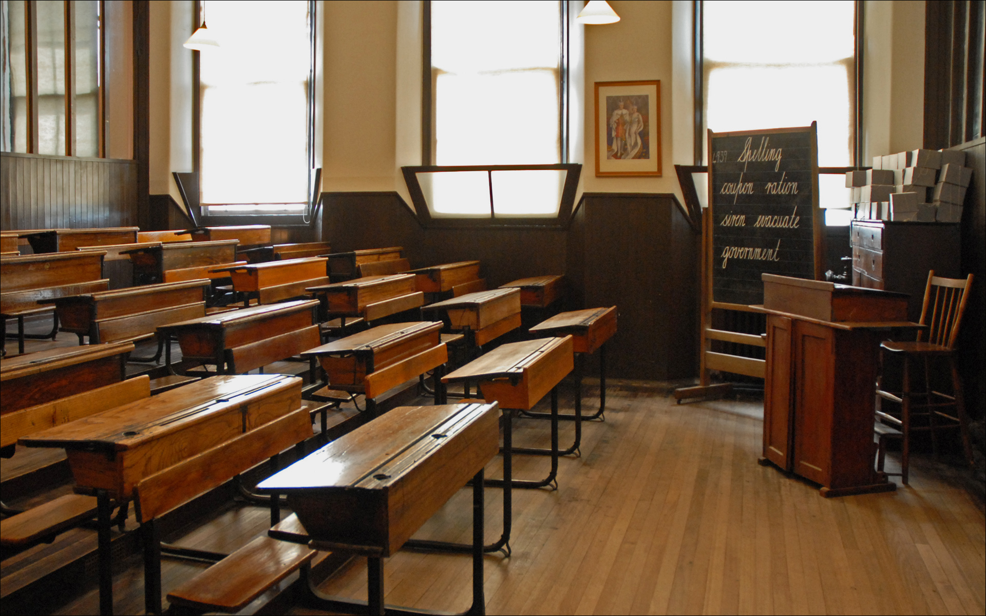 Reconstitution d'une salle de classe de la période 1939-1945 Cette école, conçue par Charles Rennie Mackintosh est devenue un musée de l'éducation en Ecosse depuis 1872, l'époque victorienne, aux années 1960. Le musée comprend des salles de classe de 4 périodes différentes reconstituées, des dioramas présentant les personnages principaux d'une école à savoir le directeur, l'institutrice, le gardien, l'infirmière, la salle (cuisine) destinée à l'apprentissage des filles des travaux ménagers, un centre d'interprétation de l'oeuvre de l'architecte et de l'histoire de l'école en Ecosse, une salle d'exposition temporaire, une cafétéria et une boutique.